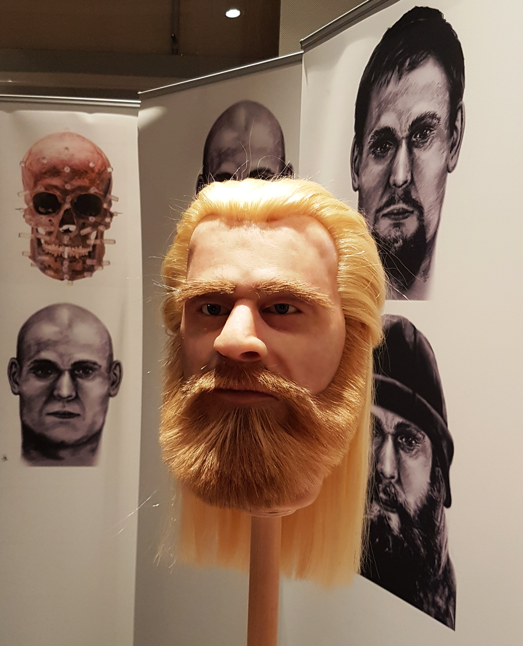 Verschiedene Varianten der Gestaltung des Gesichtes des "Herrn von Boilstädt"